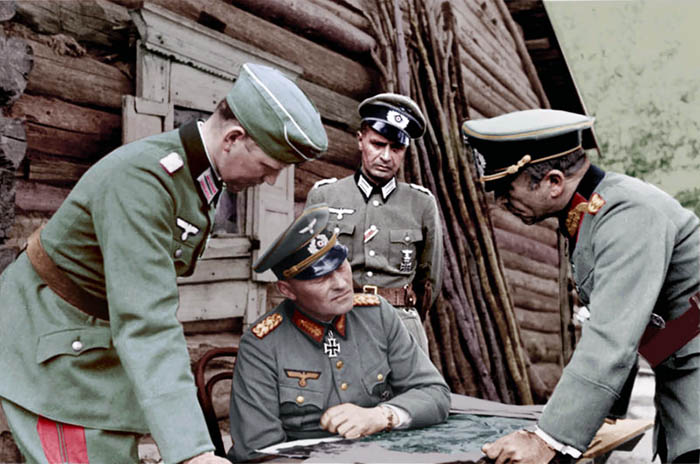 Sowjetunion, vor Leningrad.- Besprechung von Offizieren vor Blockhaus. sitzend: Generaloberst Erich Hoepner, rechts: Generalmajor Franz Landgraf; PK 694